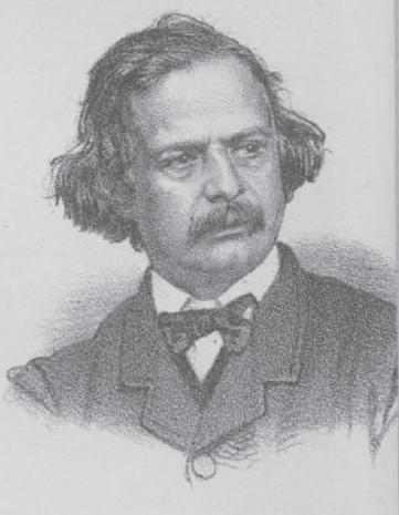 Griechischer Maler und Journalist, 19. Jahrhundert